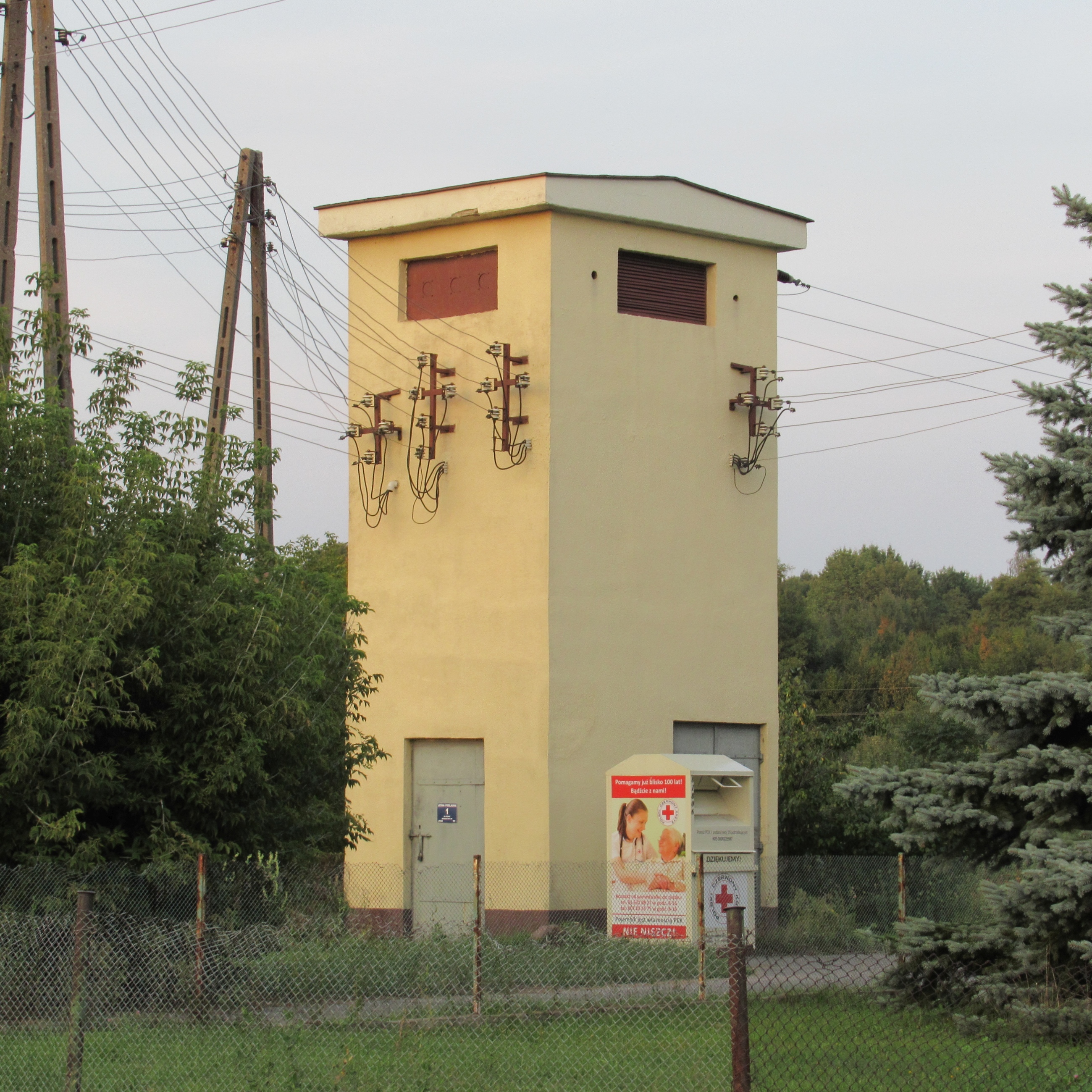 Leśna Podlaska (pow. bialski, woj. lubelskie, Polska). Wieża transformatorowa.